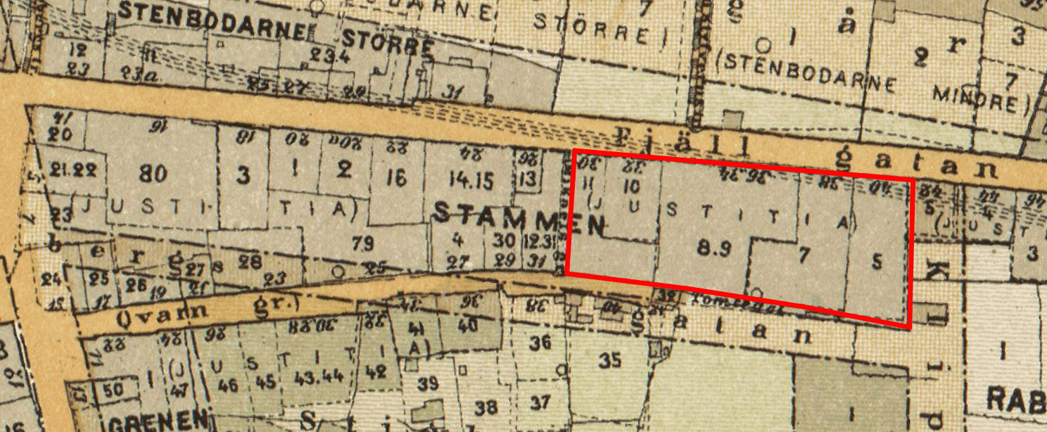 Del av Stockholmskarta visande kvarteret Stammen med dagens kvarteret Kronan inom röd markering